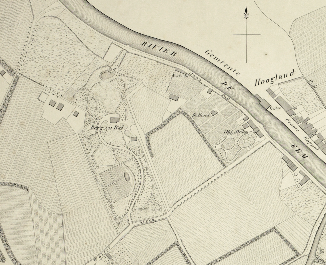 Kaart met het gebied ten noordoosten van het centrum van Amersfoort, met buitenplaats Berg en Dal aan de Wolfersteeg, oliemolen De Rijzende Zon en de rivier de Eem. Uitsnede uit een kaart van Amersfoort van D.J. Thomkins uit 1846 (zie Amersfoort Thomkins 1846.jpg)